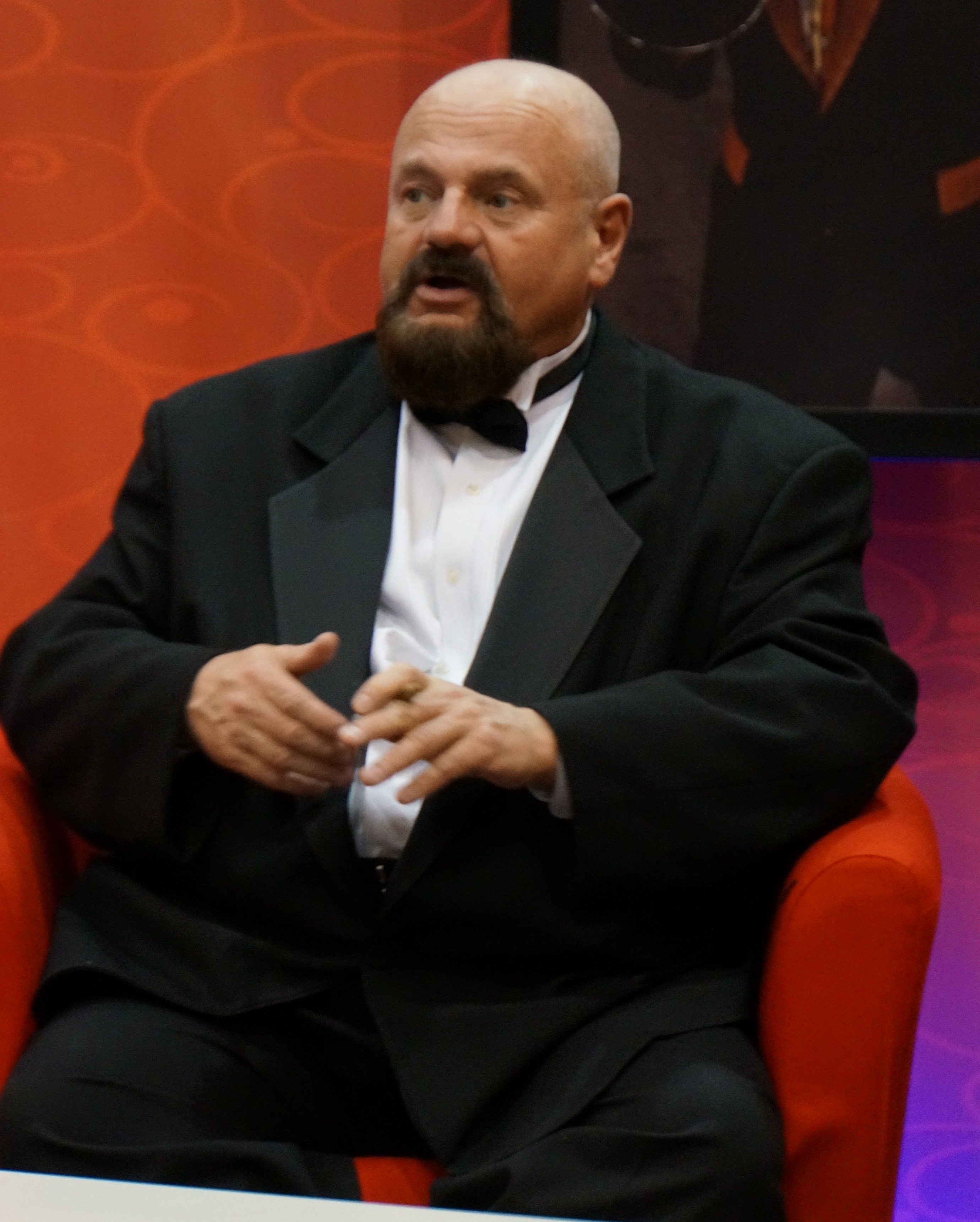 Howard Finkel in 2014